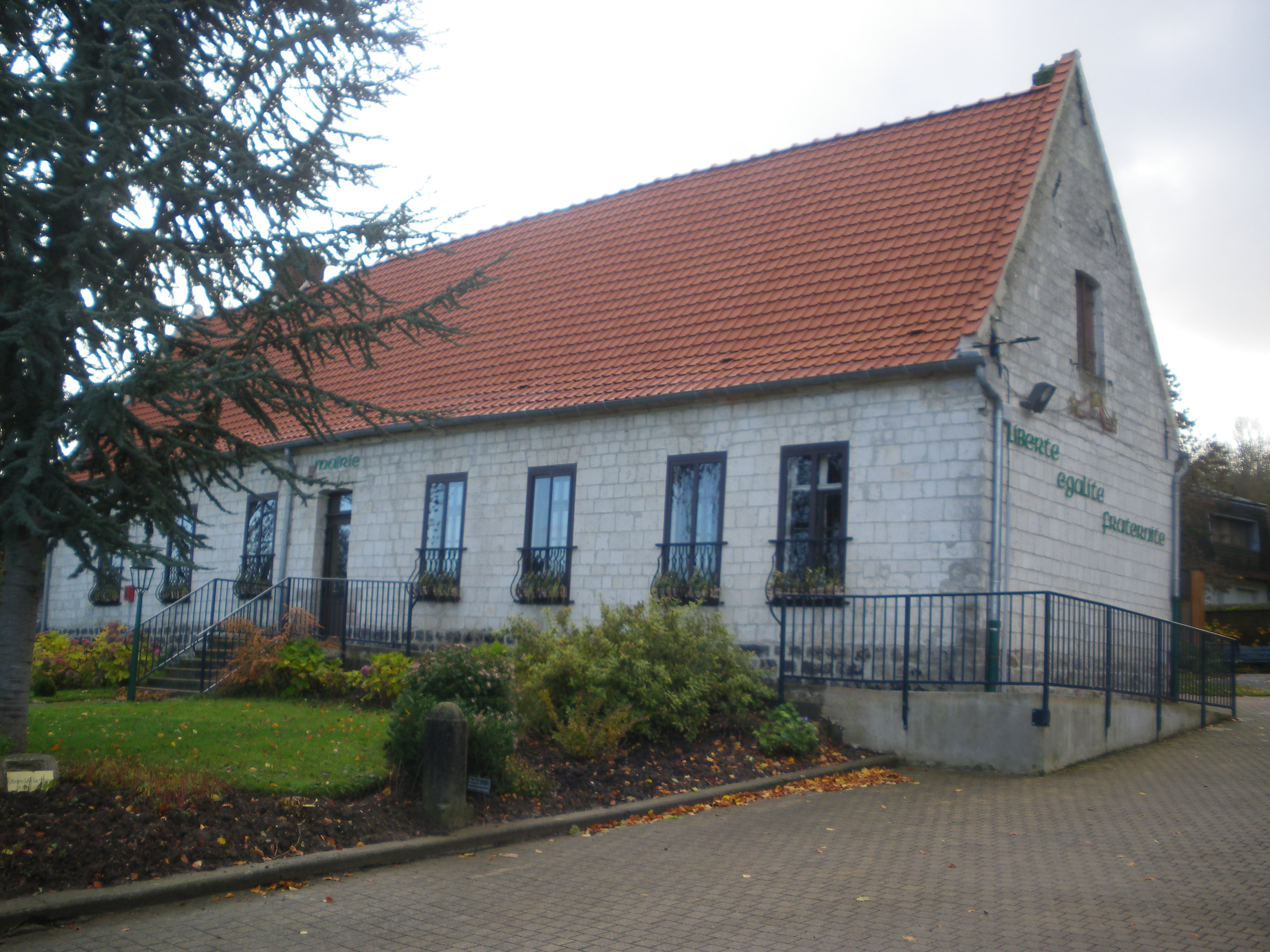 Vue de la mairie de Ruitz.